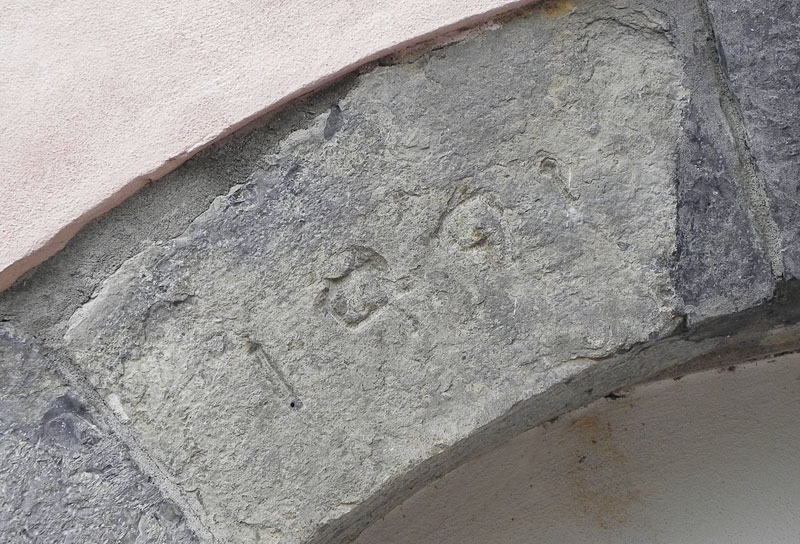 Chiesa della Madonna delle Grazie, Gorno - Dettaglio della Pietra incisa con la data 1491.